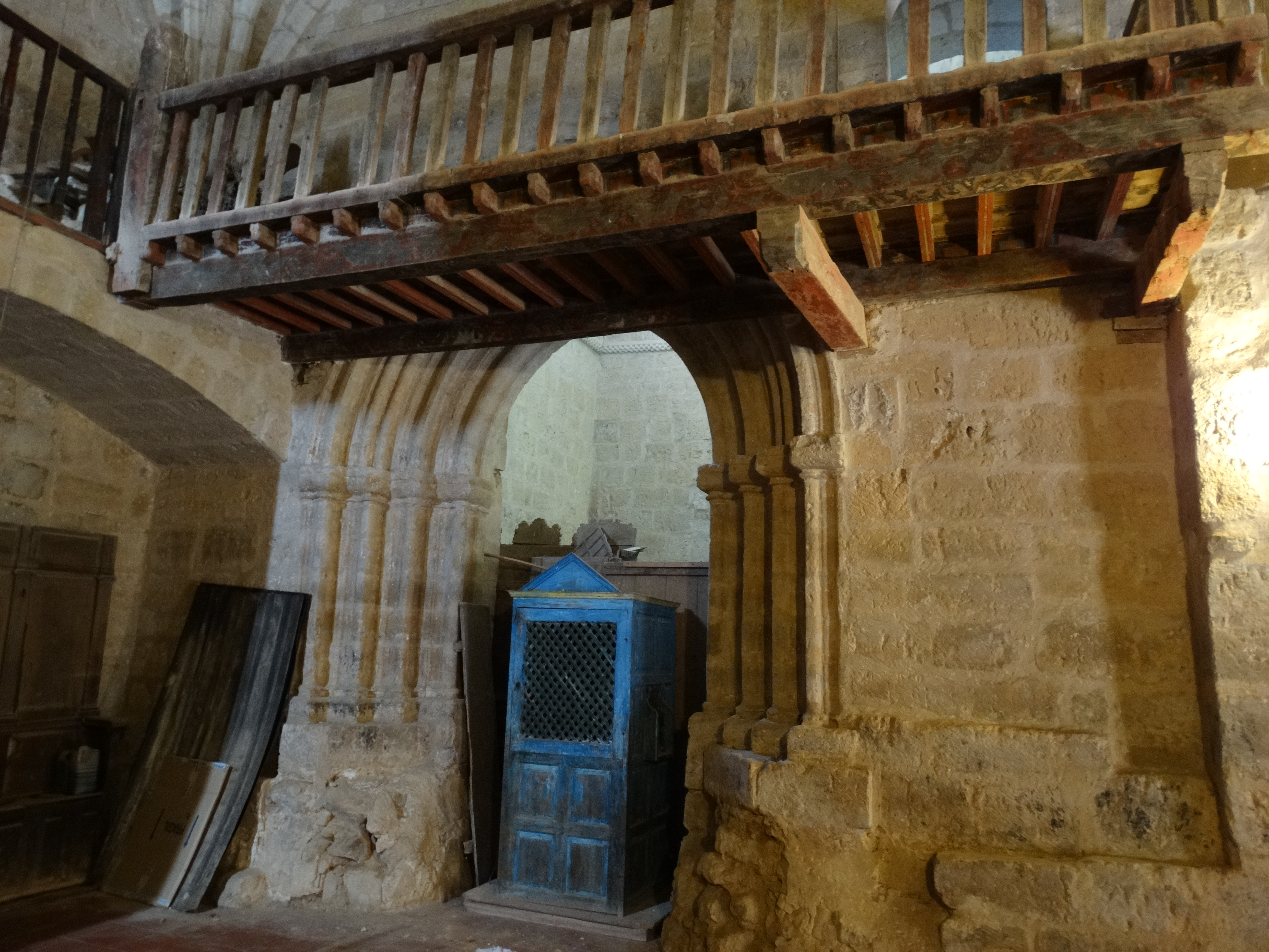 Torremormojón, provincia de Palencia, España. Interior de la iglesia de Santa María del Castillo. Coro alto y puerta románica antigua descubierta al hacer unas reformas.